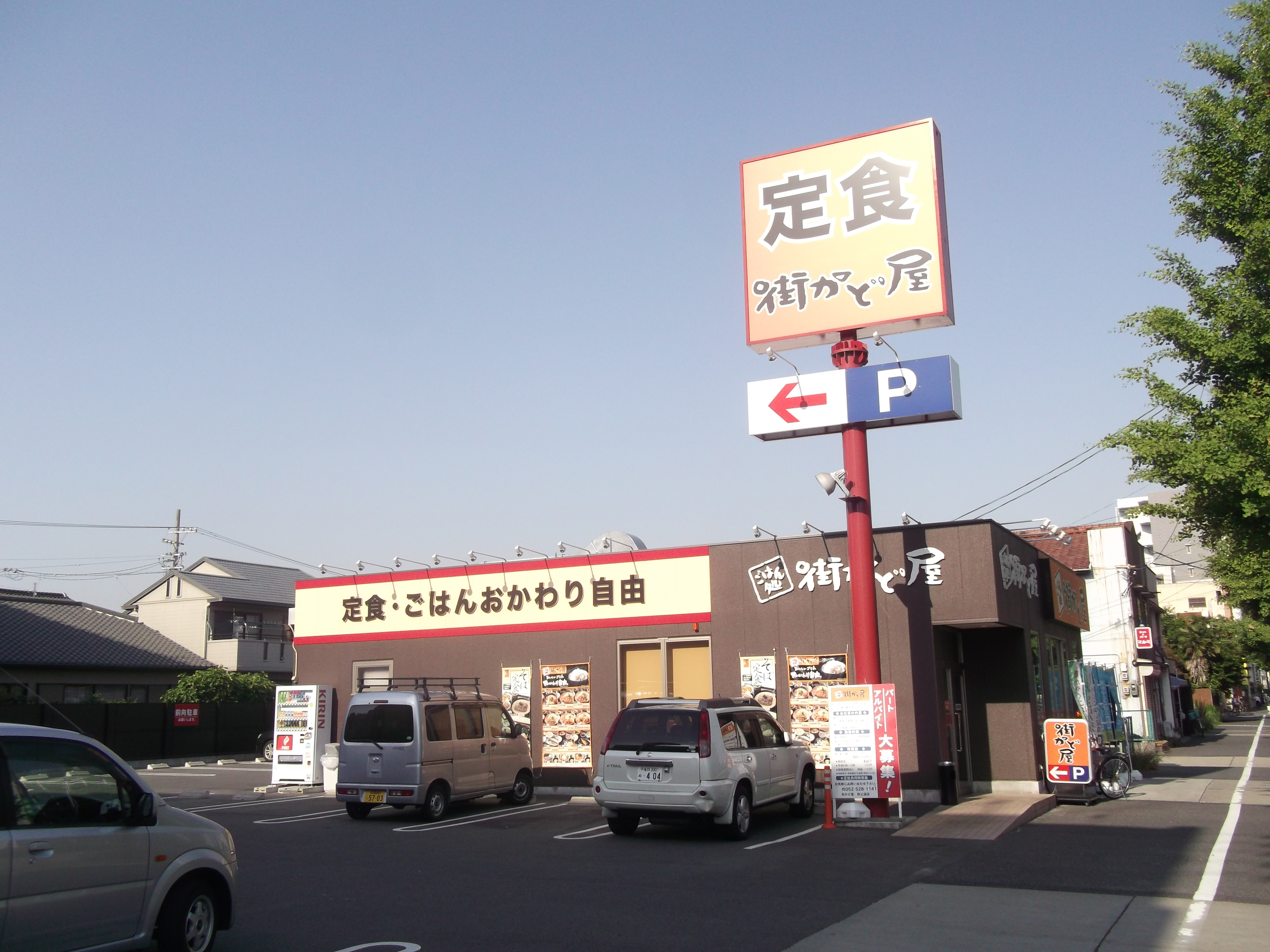 名古屋市西区秩父通にある街かど屋秩父通店を南側公道西側より写す